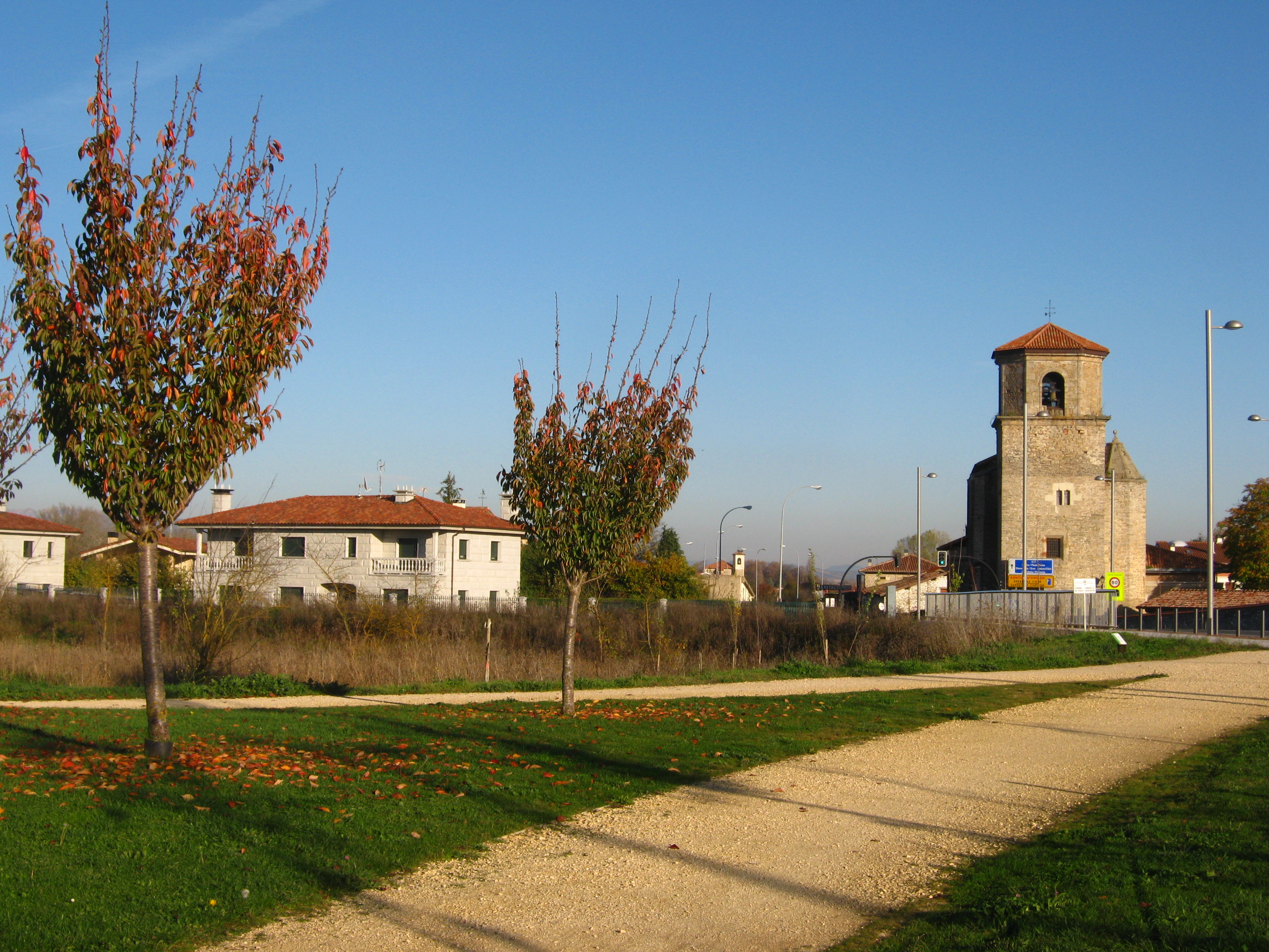 Elorriaga (Álava, España)